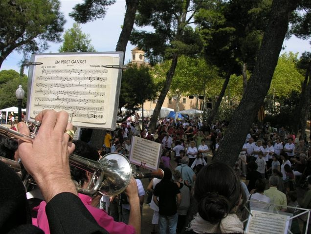 Cobla a l'Aplec Baix Camp de Reus, any6 2009